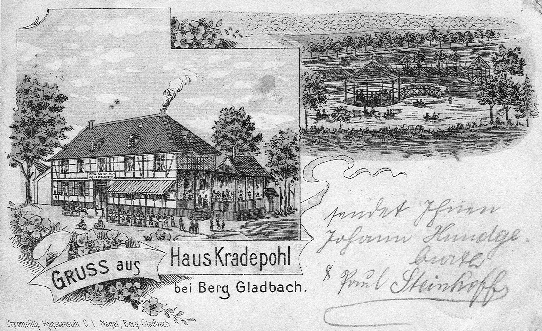 Lithographie von Haus Kradepohl, abgebrochen 2009